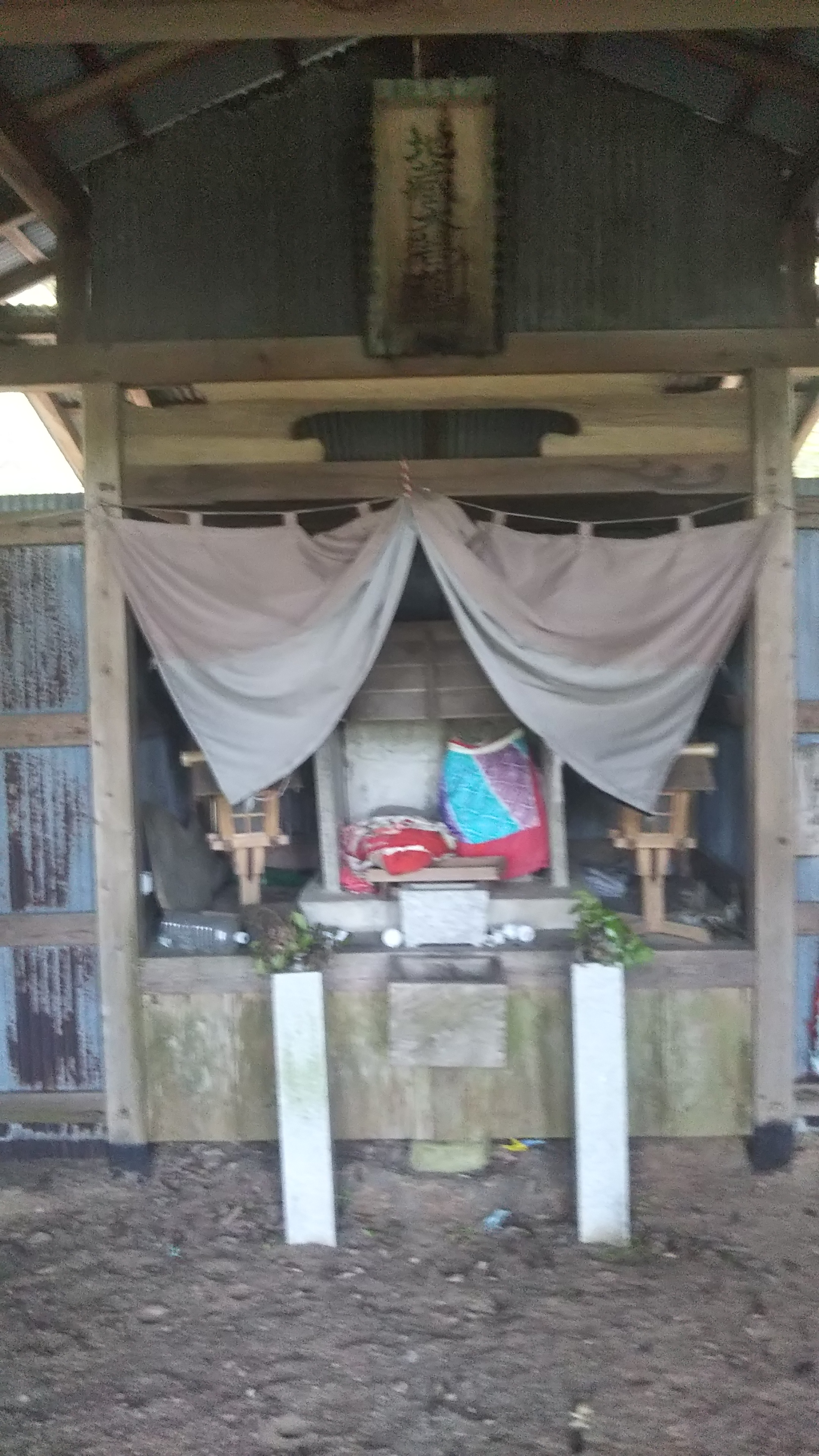 栗栖野城にあるイボ取り地蔵